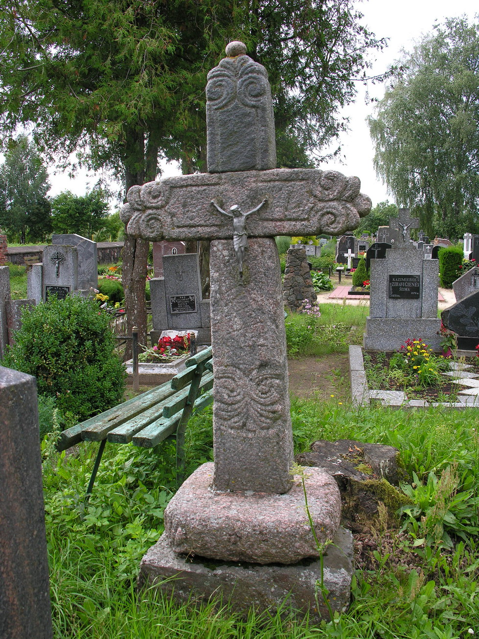 Skulptoriaus Stepono Gailevičiaus antkapinis paminklas Ukrinų kapinėse, mažeikių raj. Foto: Algirdas, 2005 m. rugpjūčio 13 d.